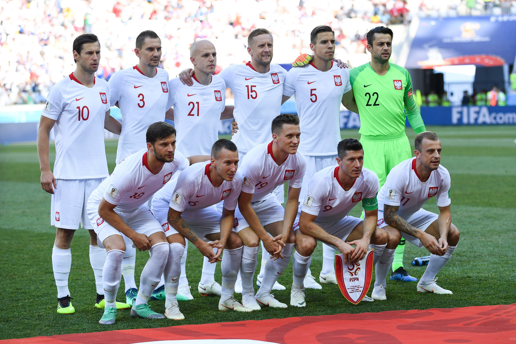 Япония проиграла Польше, но вышла в плей-офф.